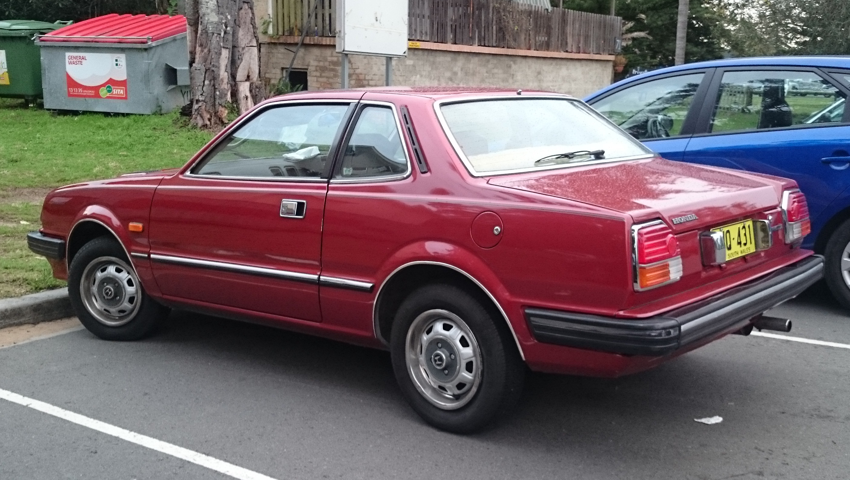 Honda Prelude